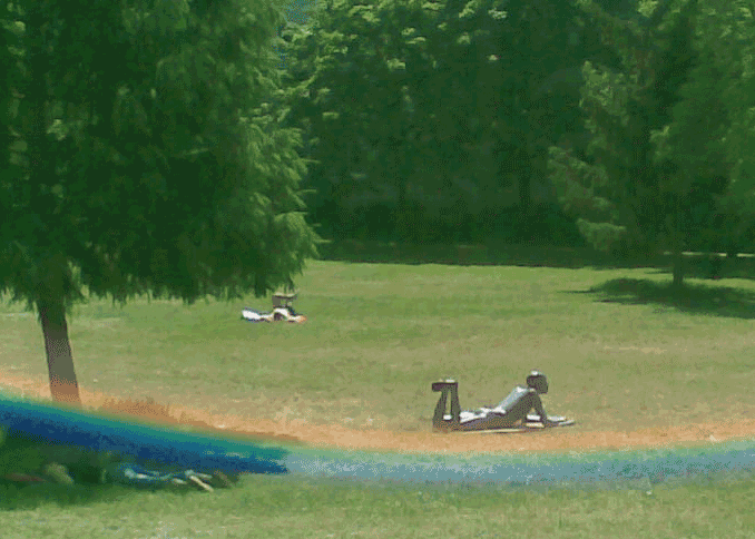 Die Plastik "Lesender Knabe" von Goettsche zwischen Sonnenhungrigen im Erich-Weinert-Park